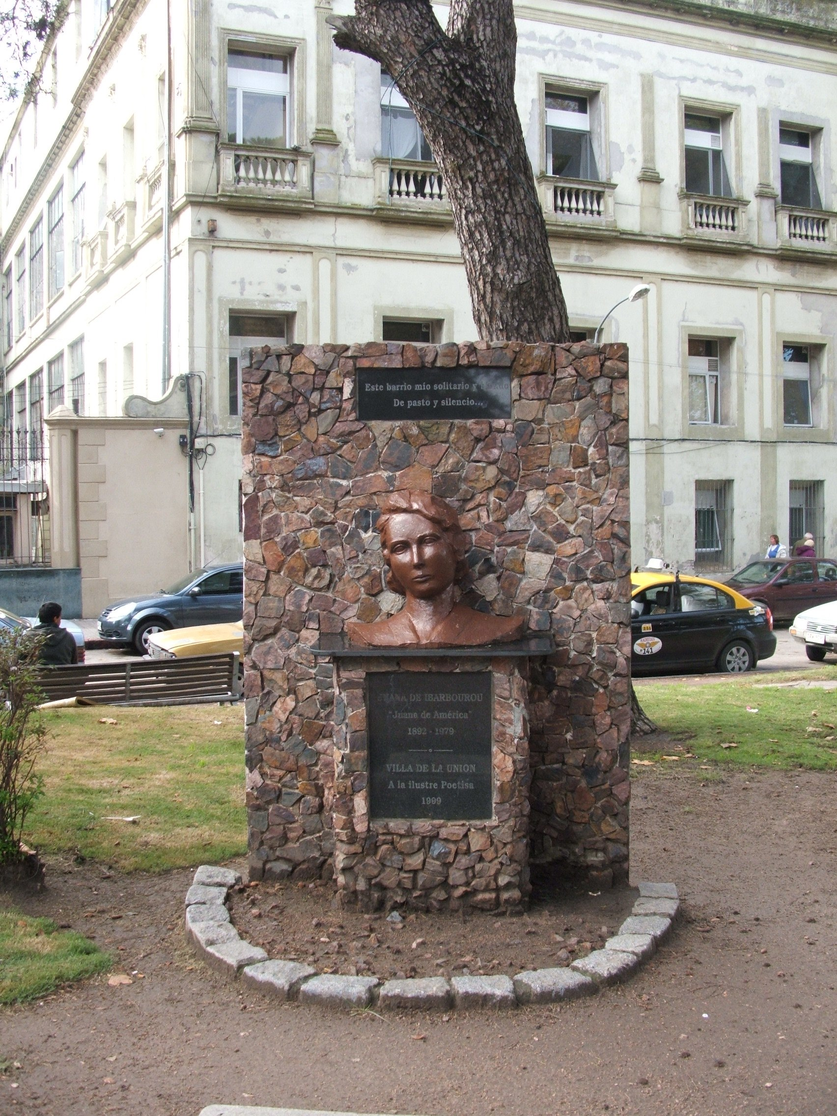 Monumento a la poetisa Juana de Ibarbourou en la Plaza Cipriano Miró, La Unión, Montevideo.